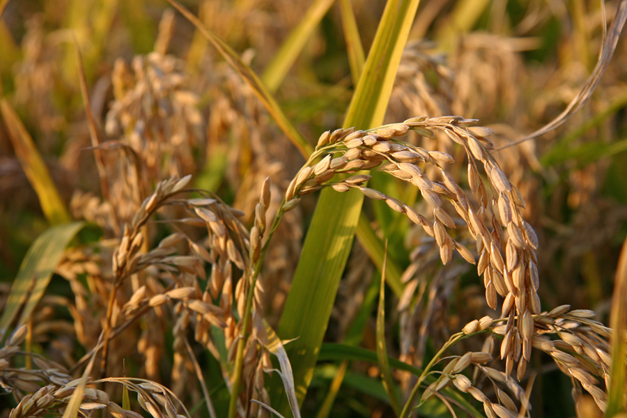 Pianta di riso maturo